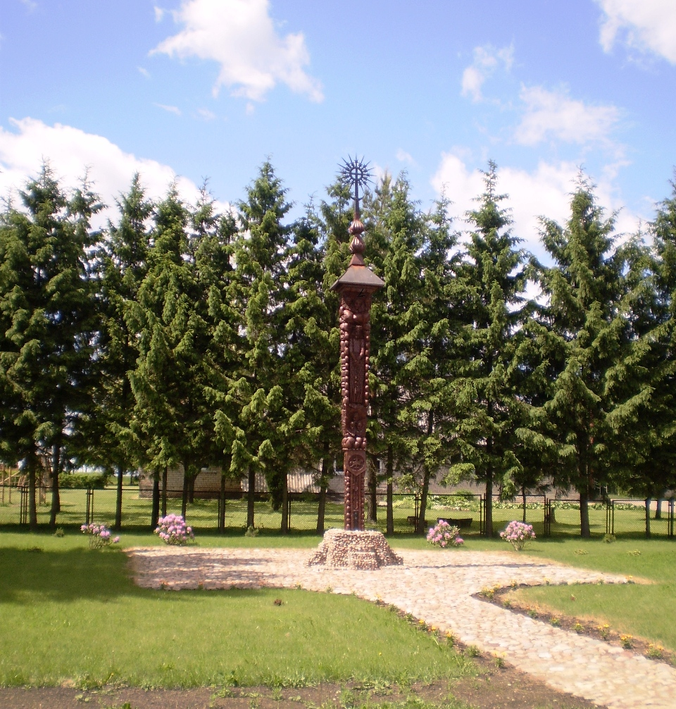 Stogastulpis, Okainiai, Kėdainių raj.